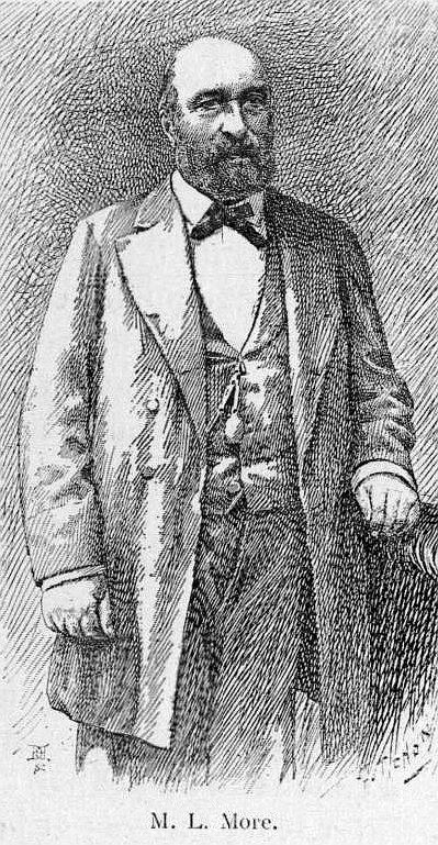 Louis More, Président de la Société des régates parisiennes, en 1853.